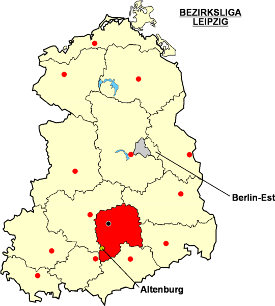 Localisation d'Altenburg dans la "Bezirksliga Leipzig" Catégorie:Logo de clubs de football - Allemagne